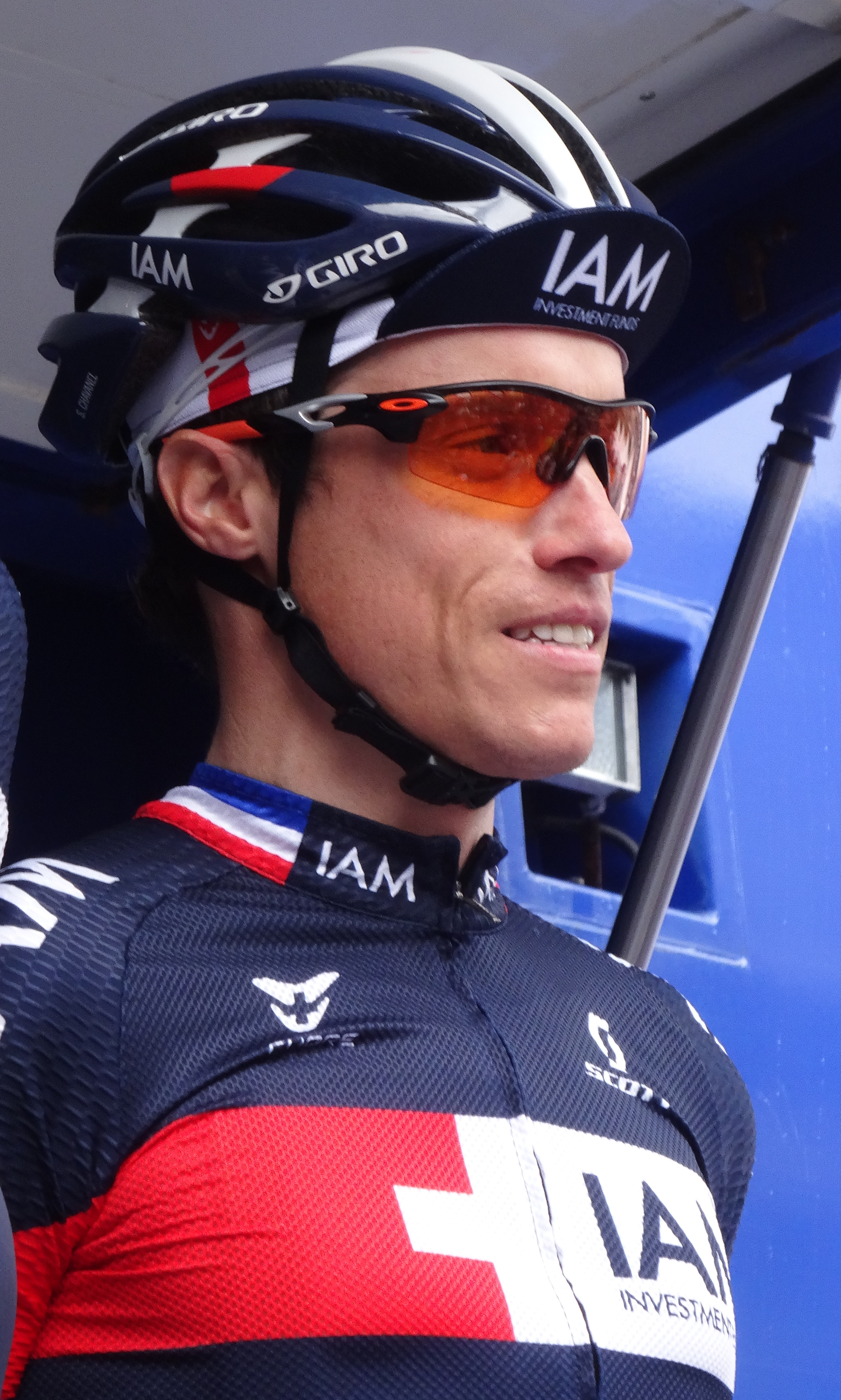 Reportage photographique réalisé le mercredi 7 mai 2014 au départ de la première étape de l'édition 2014 des Quatre jours de Dunkerque à Dunkerque, Nord, Nord-Pas-de-Calais, France. Depicted person: Sylvain Chavanel Depicted team: IAM